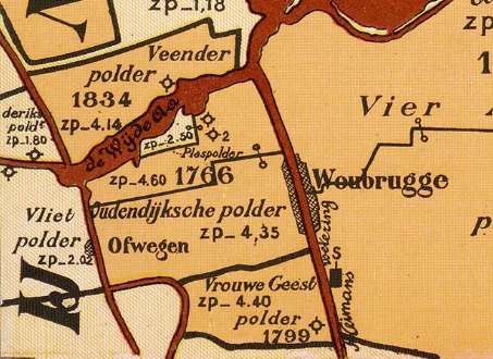 Oudendijkse polder